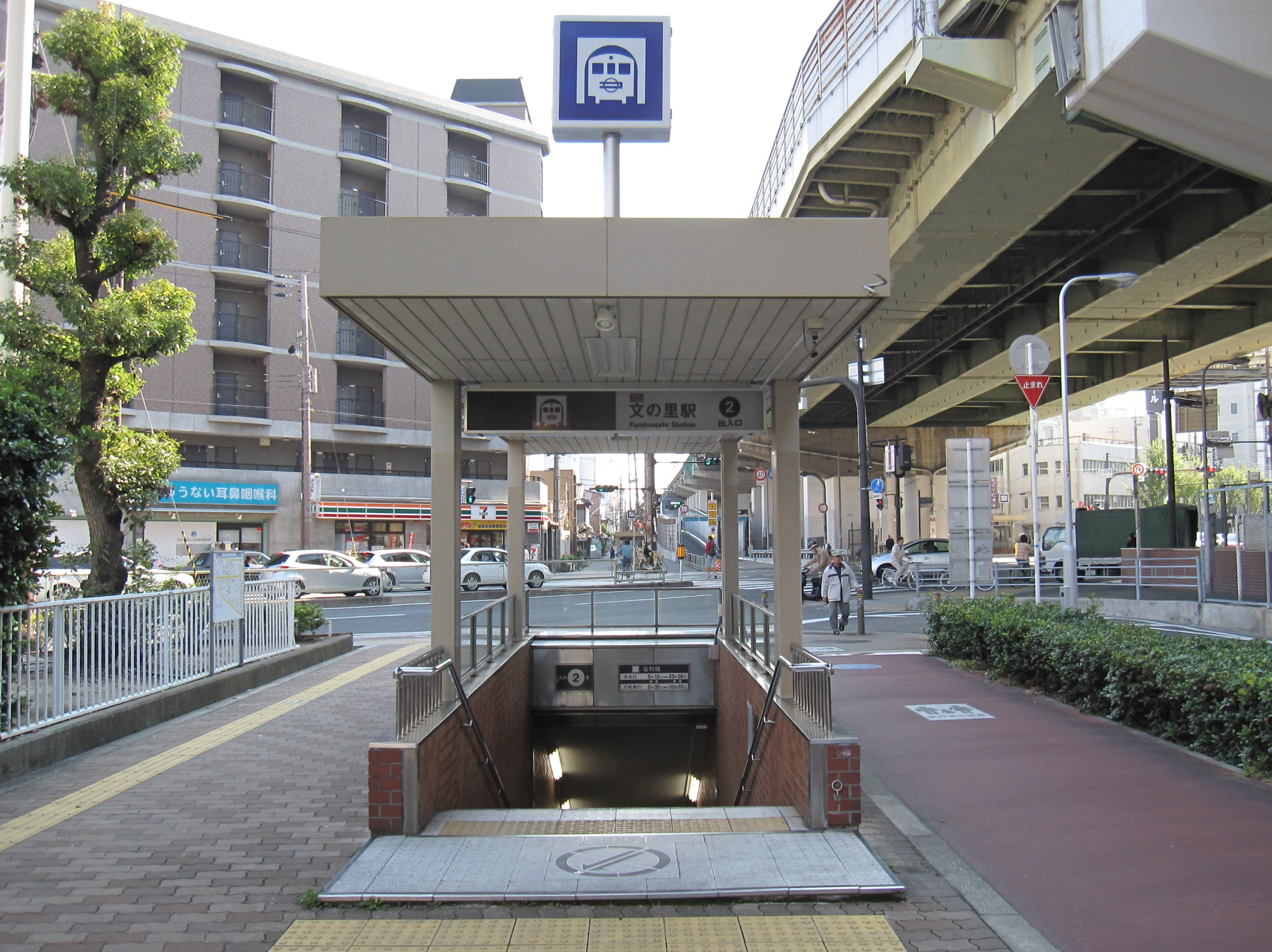 大阪市営地下鉄谷町線文の里駅